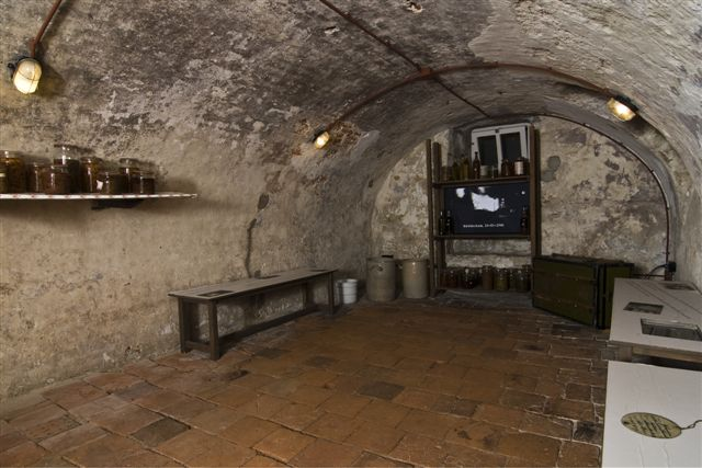 Schuilkelder onder het pand Markt 12 te Aalten, waarin thans het Nationaal Onderduikmuseum is gevestigd.